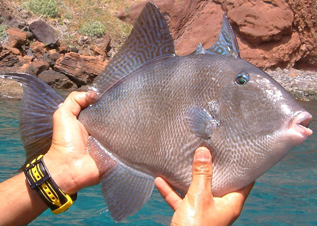 Madeira Drückerfisch Küste Funchal 5-07. Mit einer Hand gefangen und wieder frei gelassen. Photograph: Peggy